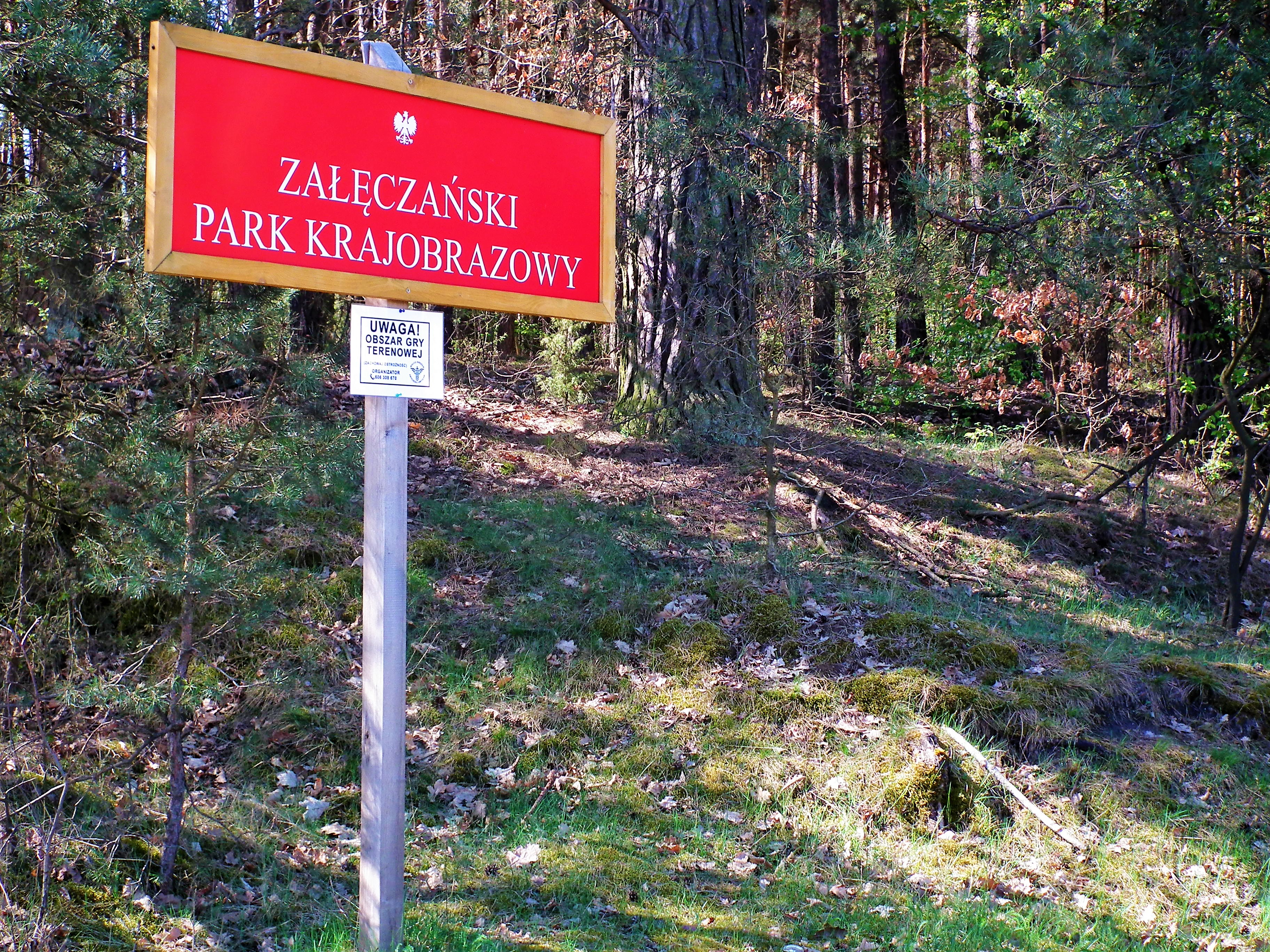 Załęczański Park Krajobr. - okolice Załęcza Wlk.